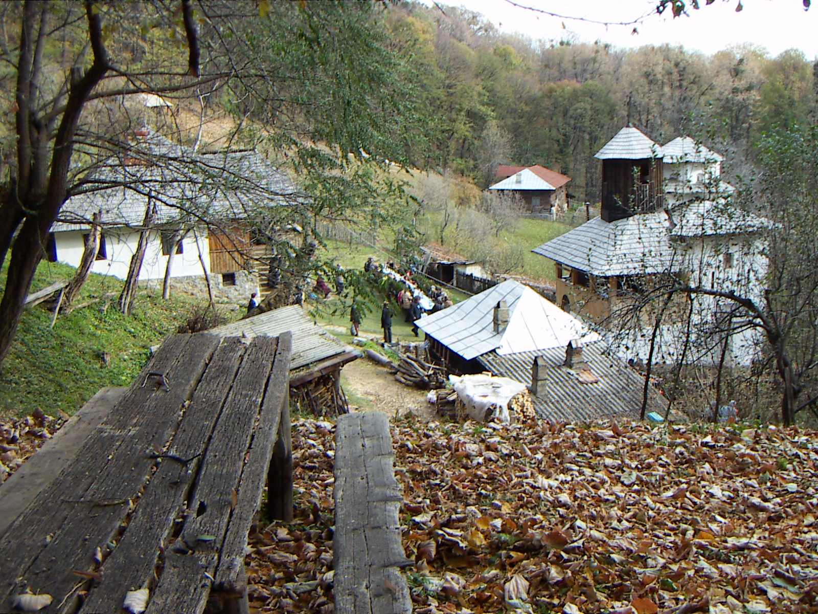 Ansamblul schitului Cioclovina de Jos, construit în anul 1715, aparţinând de Mânăstirea Tismana, oraşul Tismana, Gorj